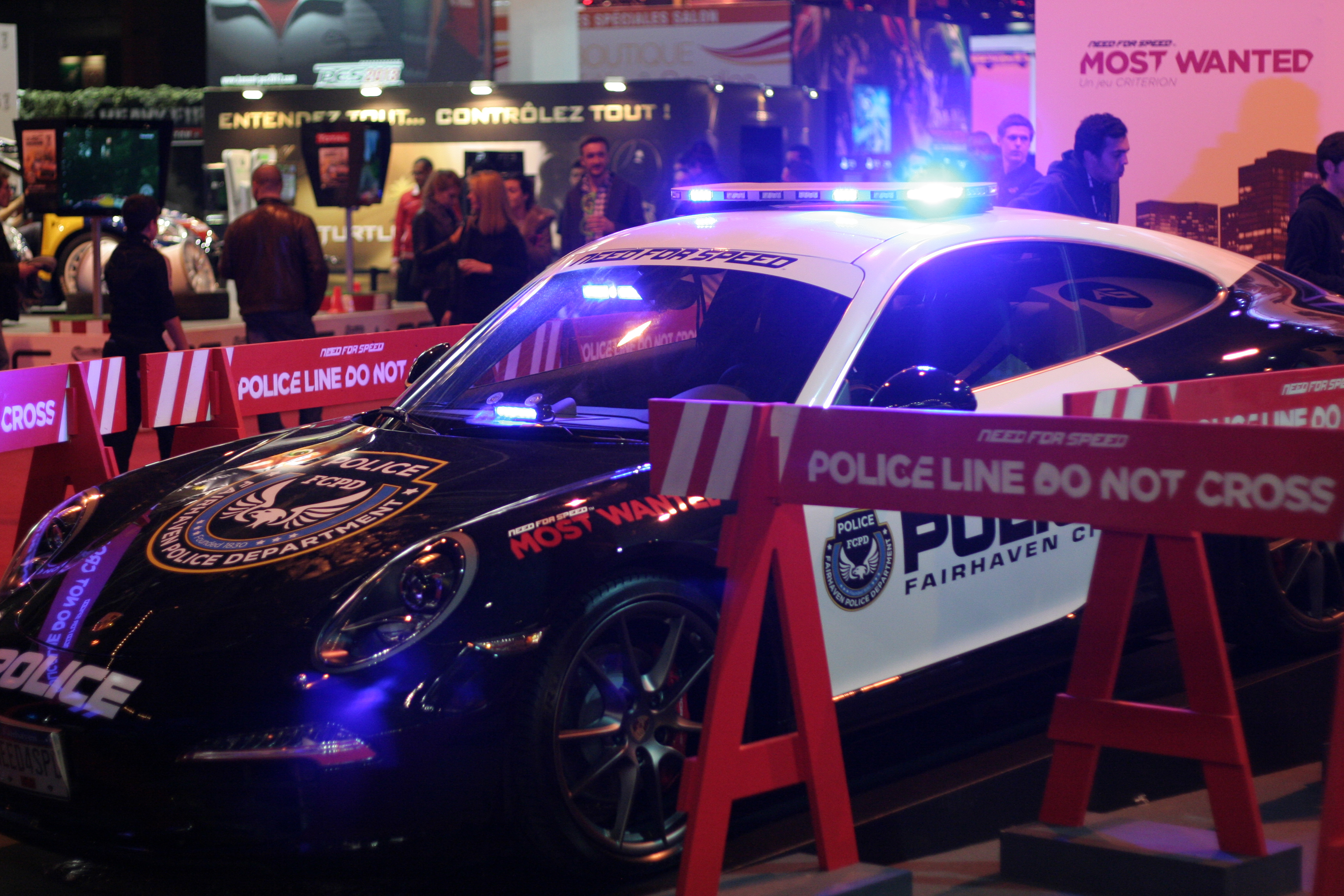 Paris Games Week 2012.